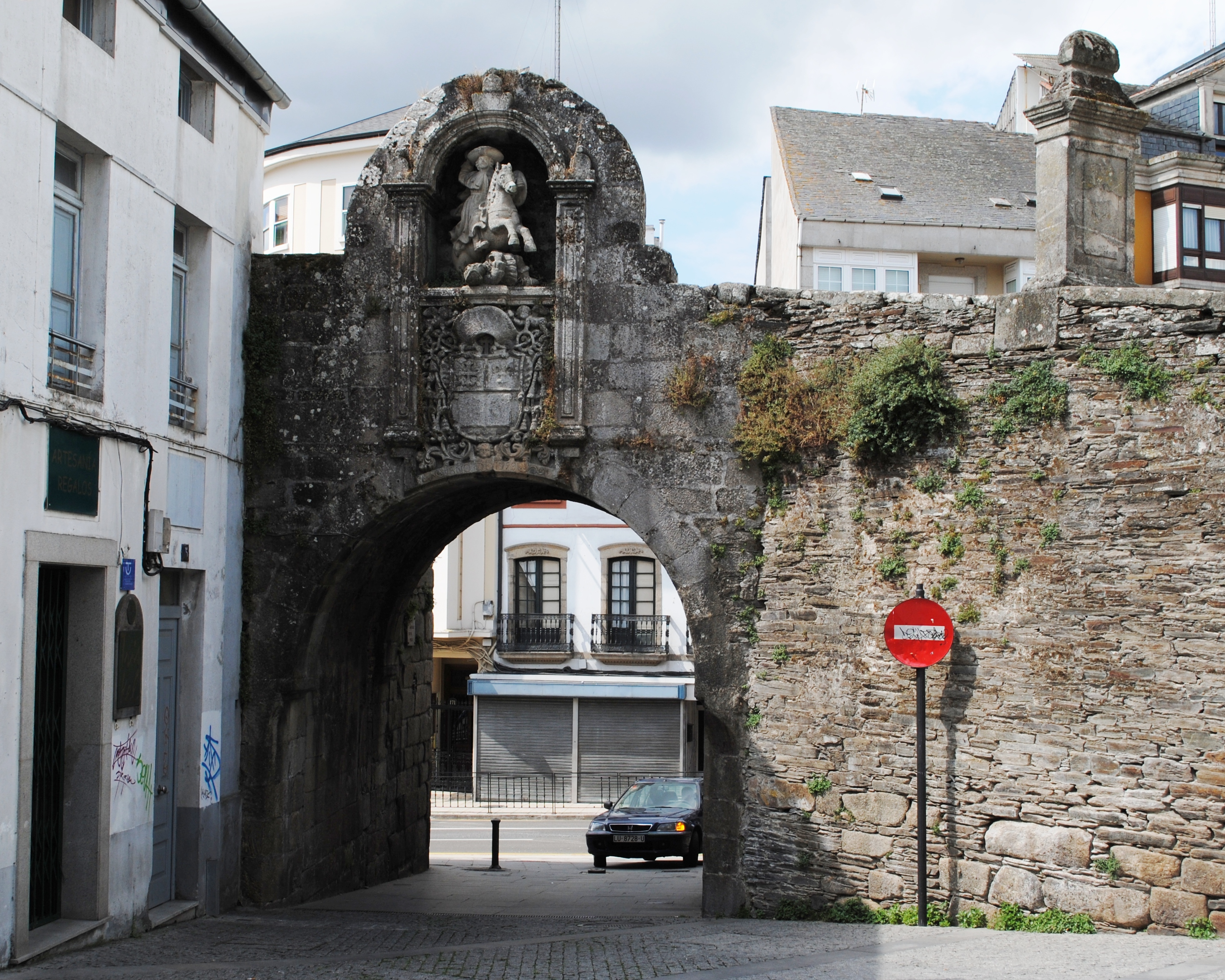 Muralla de Lugo, Porta de Santiago